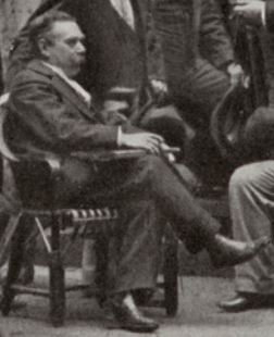 Friedrich Müller (1842–1917), Vorsitzender des Rechtschutzverbandes Deutscher Photographen, auf der Vertrauensmänner-Versammlung 1898 in Berlin